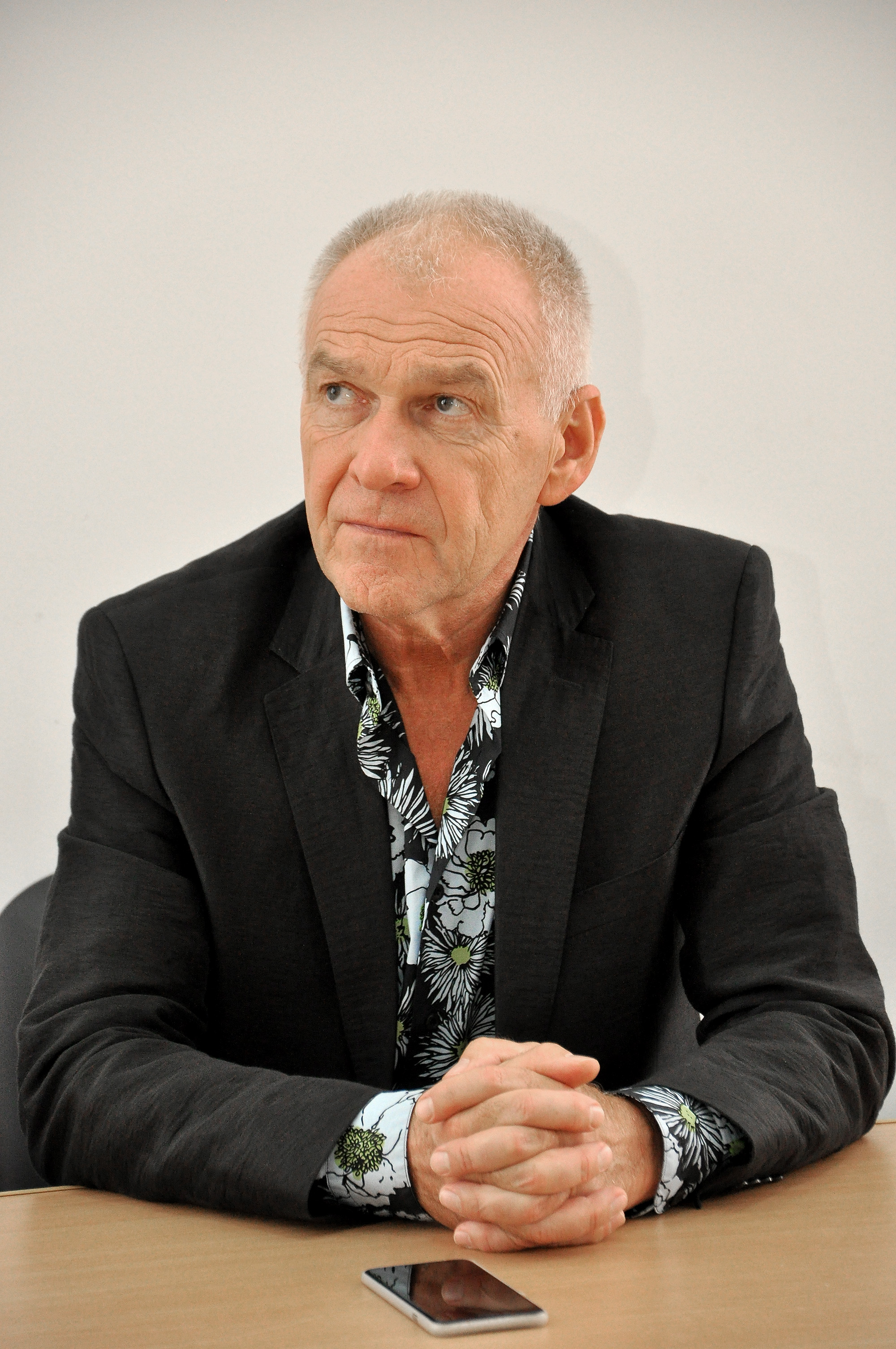 Український вчений у галузі медицини, лікар-хірург, громадський діяч Володимир Шкробот.